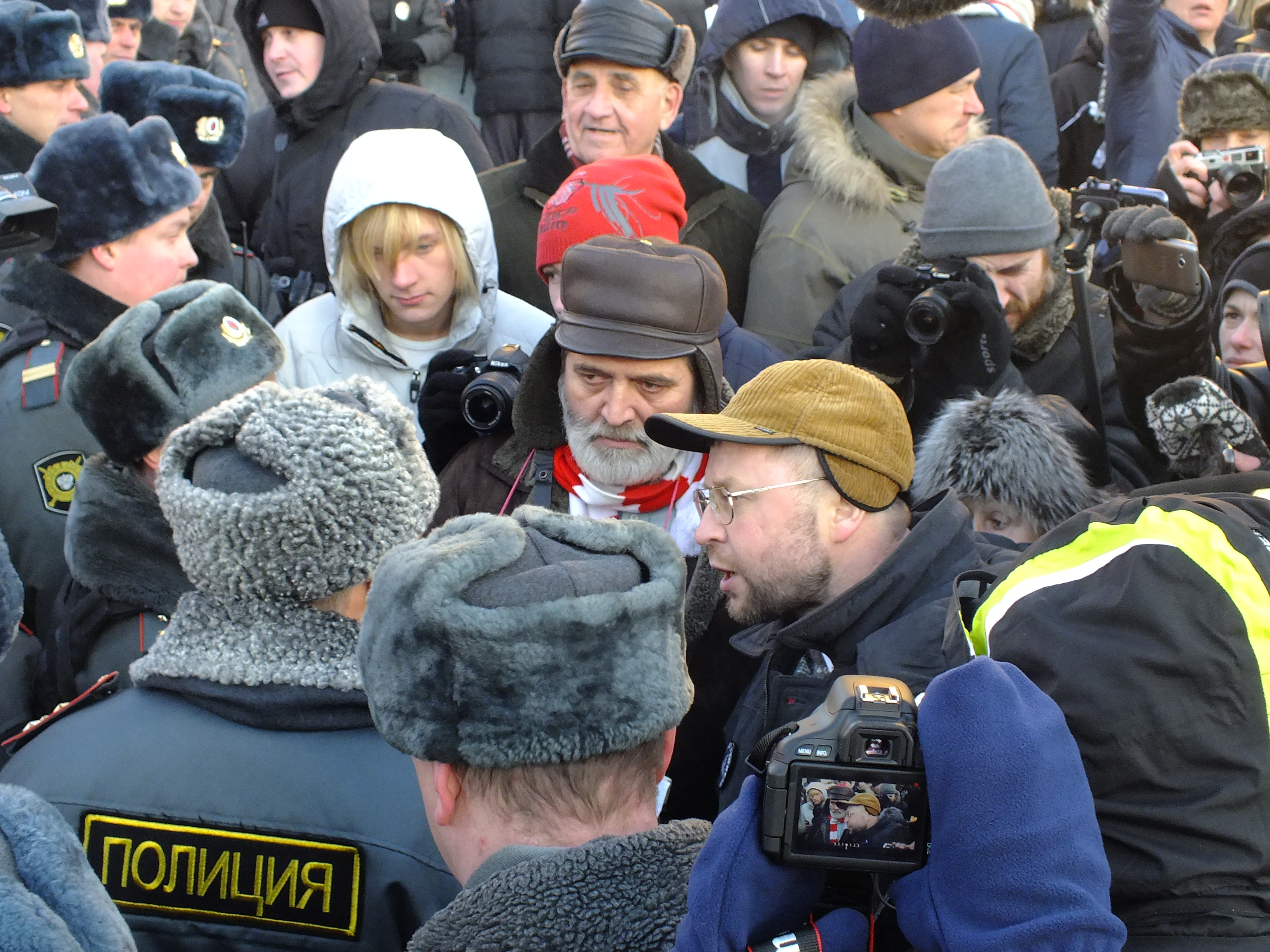 Лубянка 2012.12.15